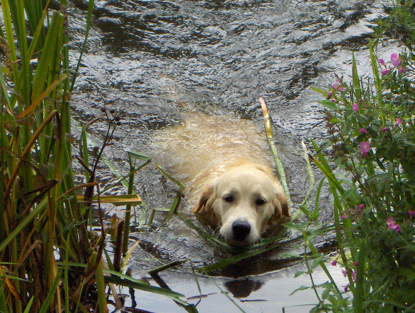 7 Monate alter Golden Retriever Rüde in SEINEM Element.